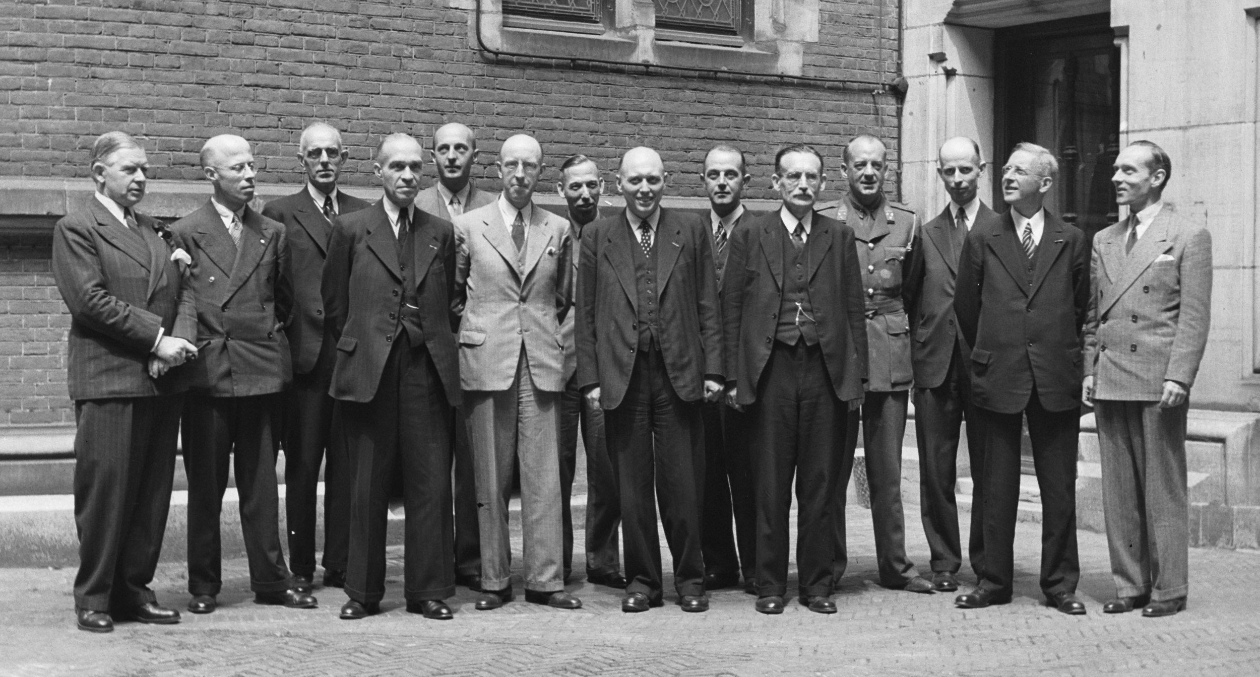 Kabinet Schermerhorn-Drees. Vlnr: J.M. de Booy (Marine), dr. L.J.M. Beel (Binnenlandse Zaken), Ir. Th.S.J.G.M. van Schaik (Verkeer en Energie), prof. dr. J.H.A. Logeman (Overzeese Gebiedsdelen), S.L. Mansholt (Voedselvoorziening, Landbouw en Visserij), prof. mr. P. Lieftinck (Financiën), ir. H. Vos (Handel en Nijverheid), prof. ir. W. Schermerhorn (minister-president, Algemene Oorlogsvoering), mr. H.A.M.T. Kolfschoten (Justitie), W. Drees (Sociale Zaken), mr. J. Meyen (Oorlog), mr. E.N. van Kleffens (Buitenlandse Zaken), dr. ir. J.A. Ringers (Openbare Werken en Wederopbouw), mr. J.H. van Roijen (Buitenlandse Zaken, zonder portefeuille). Dr. G. van der Leeuw (Onderwijs, Kunsten en Wetenschappen) ontbreekt op de foto. Collectie ANEFO NL-HaNA 2.24.01.03 0 900-4318